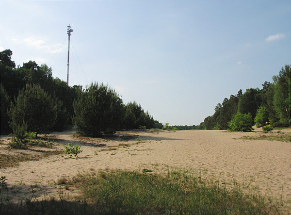 Ehemaliger Grenzstreifen zwischen Westberlin (Berlin-Frohnau) und Brandenburg (Schönfließ) in der Bieselheide